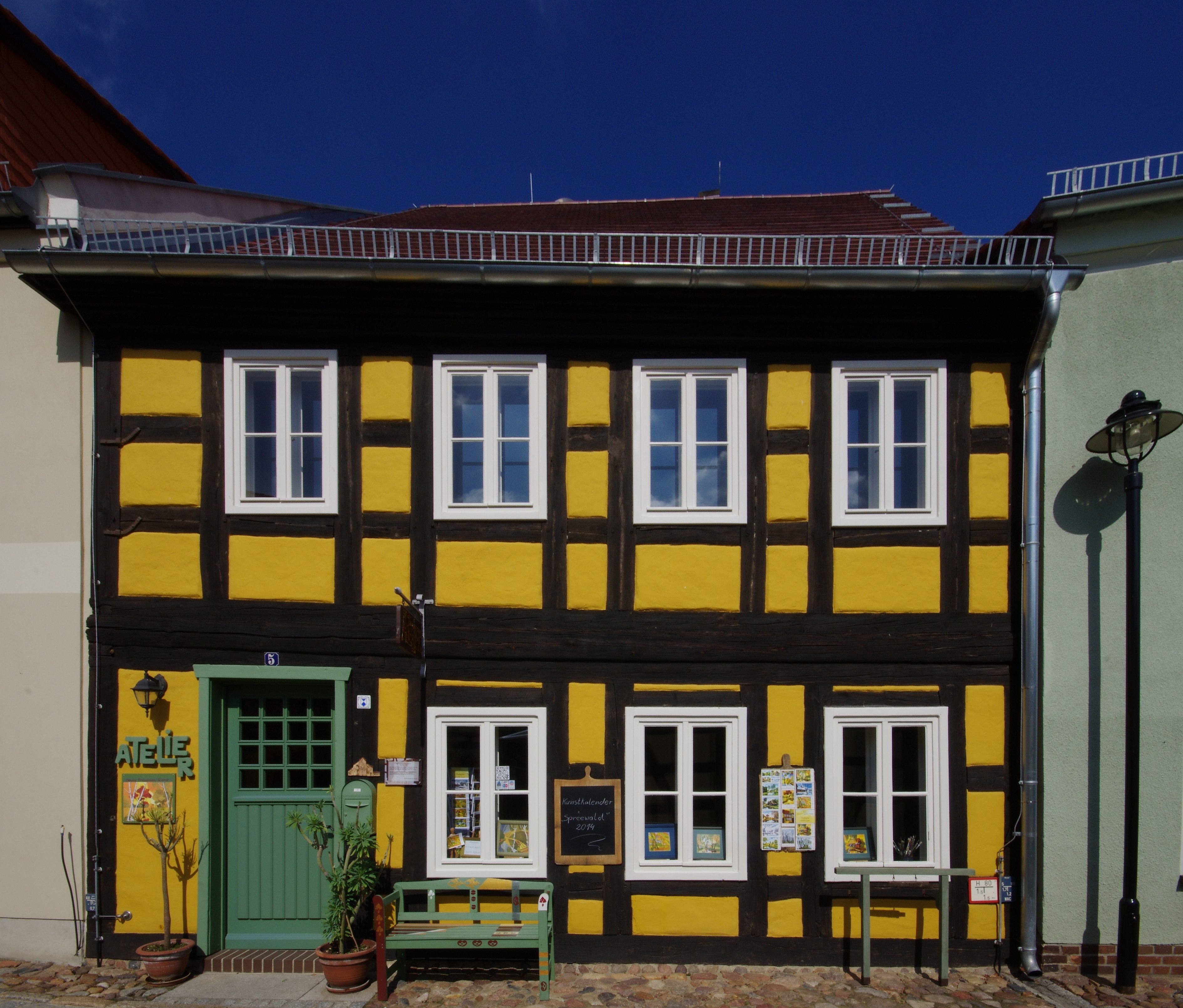 Lübbenau/Spreewald in Brandenburg. Das Haus in der steht unter Denkmalschutz.